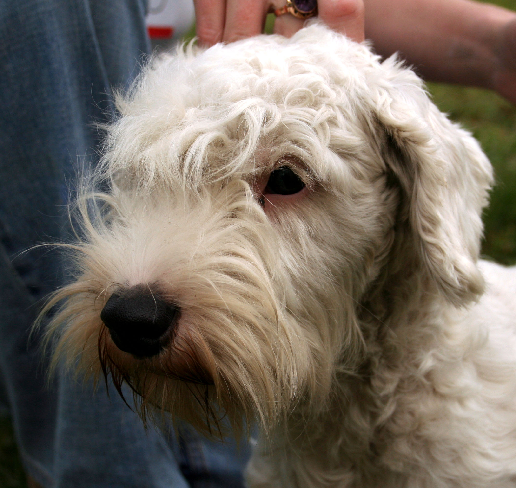 Sealyham_terrier na krajowej wystawie w Rybniku - Kamieniu